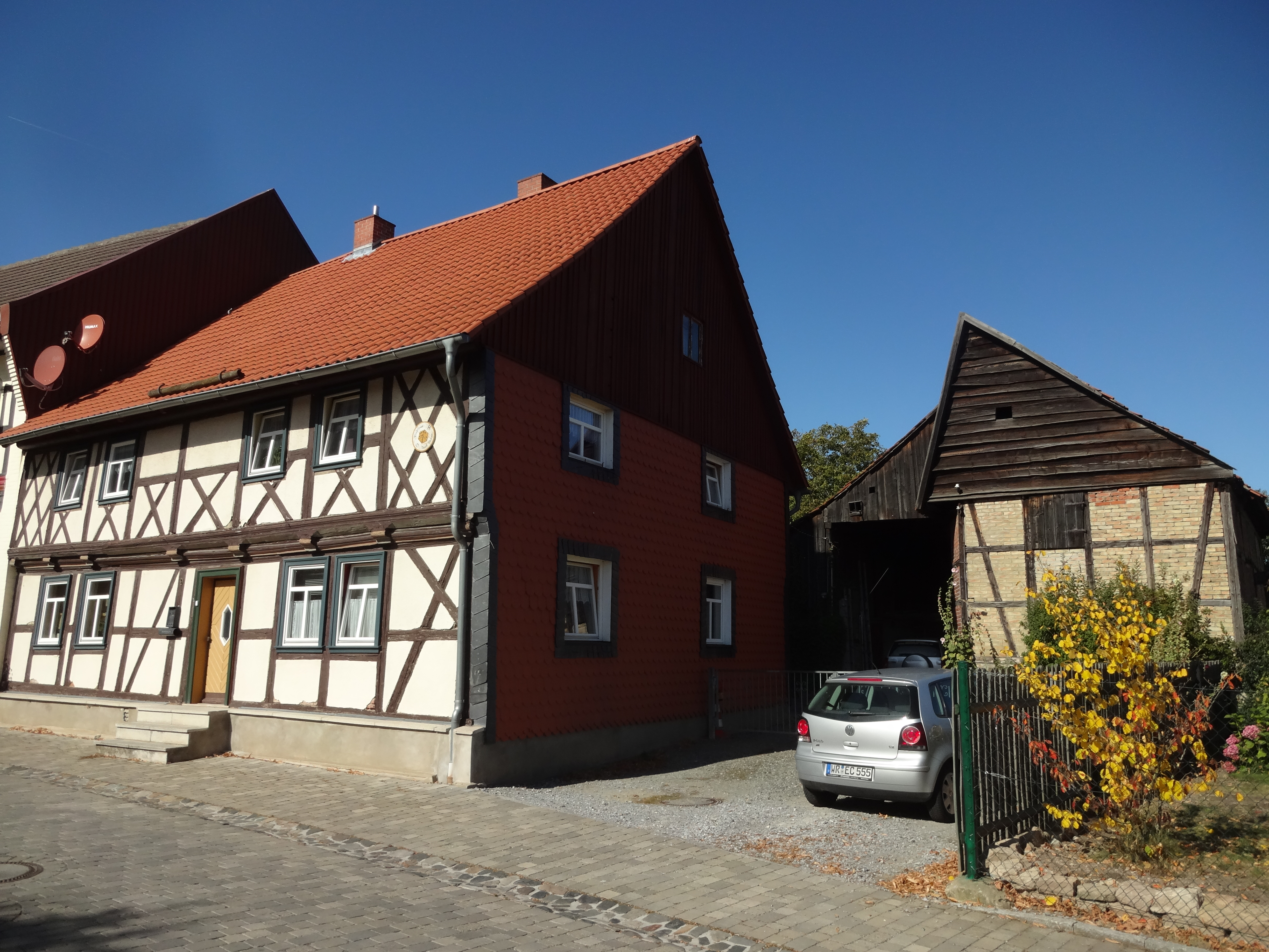 denkmalgeschütztes Wohnhaus in der Hauptstraße 9 in Drübeck